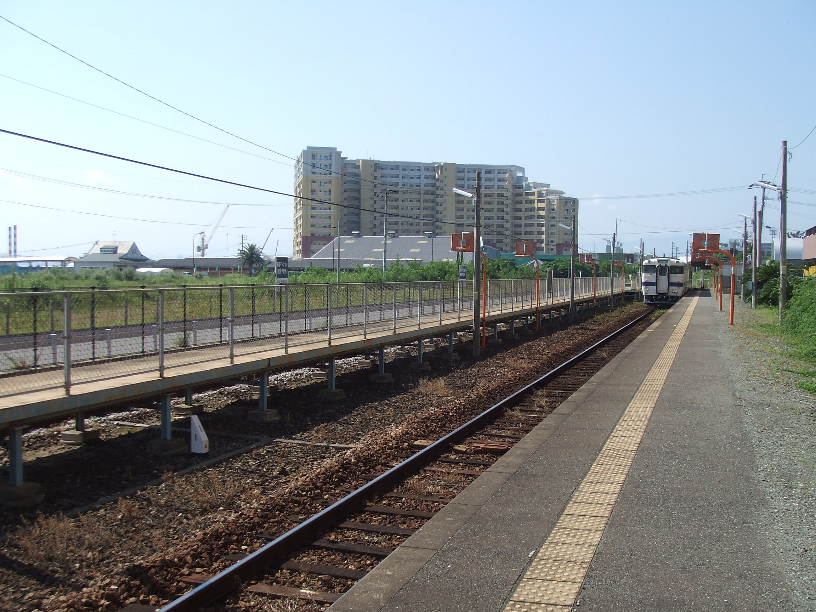 西戸崎駅 駅構内の様子